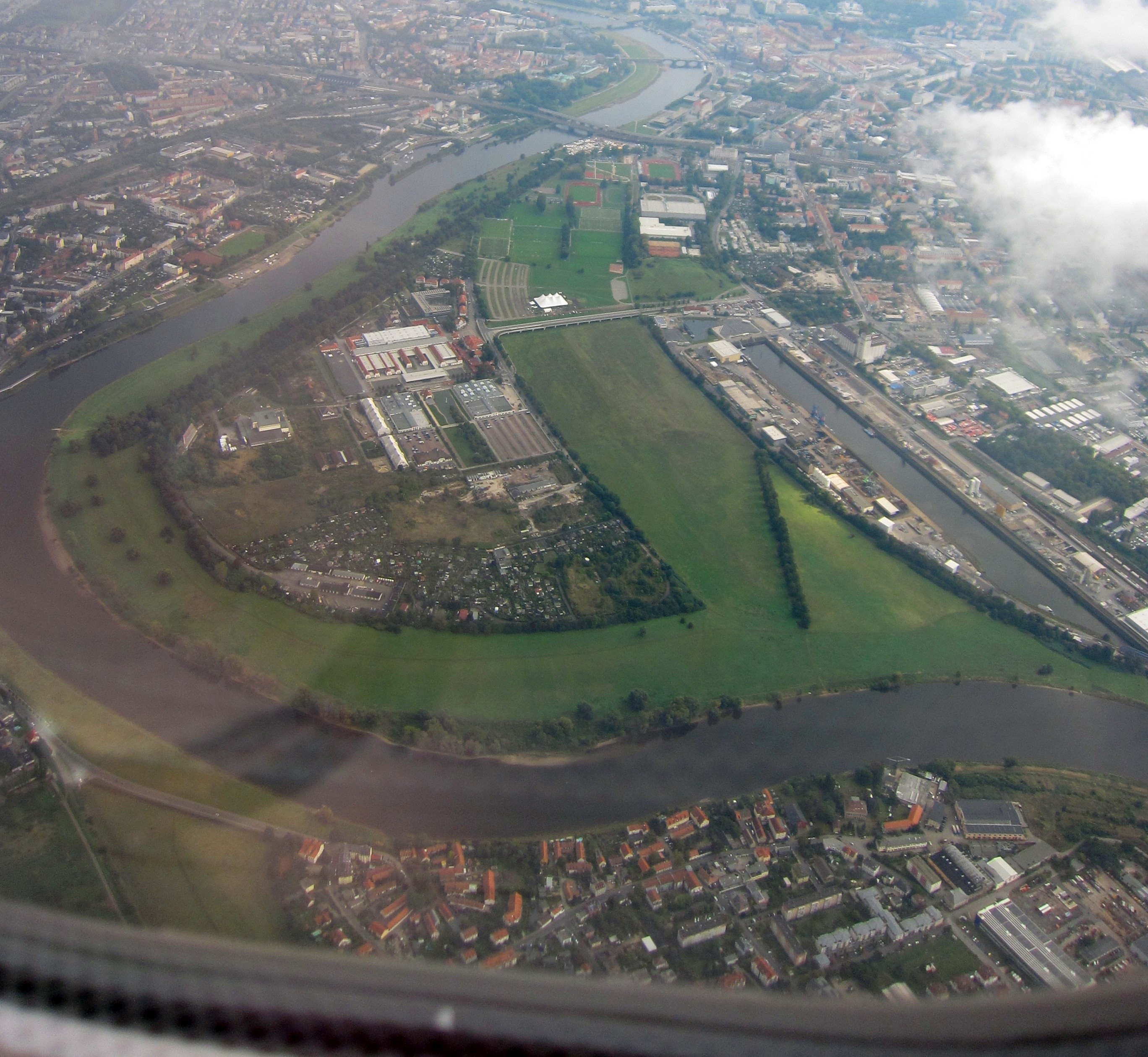 Das Ostragehege mit Elbbogen, Flutrinne und Alberthafen